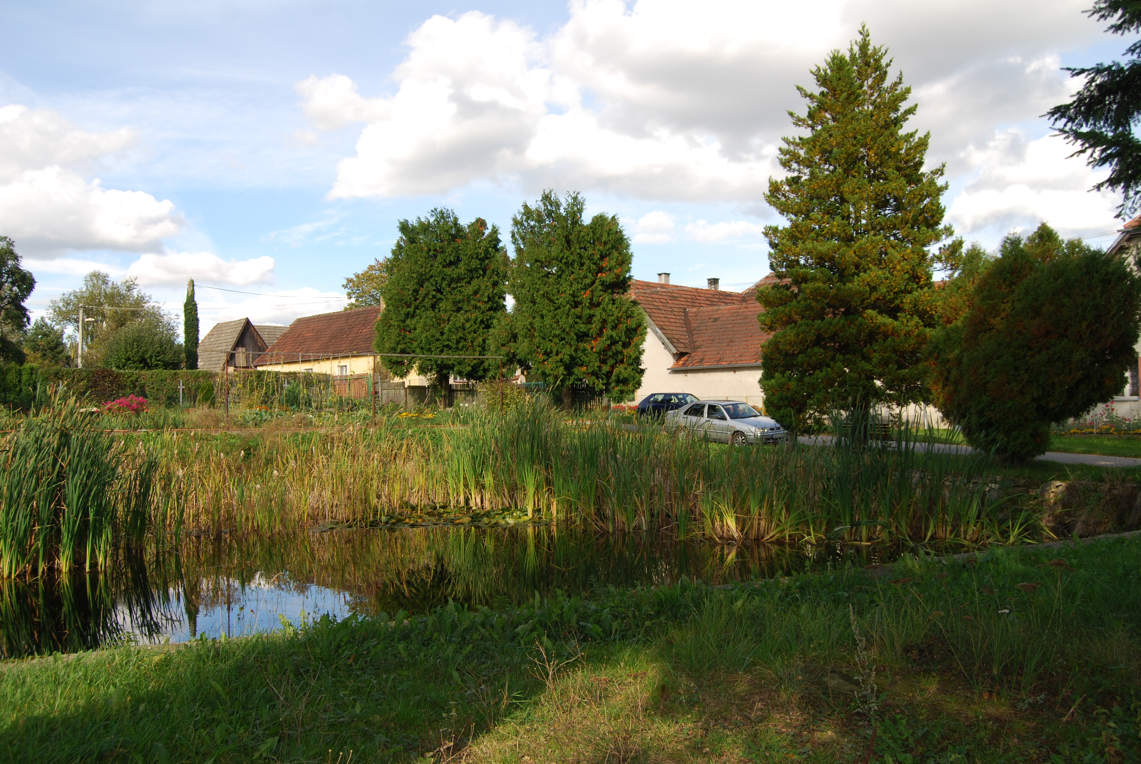 Návesní rybník. Popovec je část obce Zběšičky v okrese Písek. Česká republika.